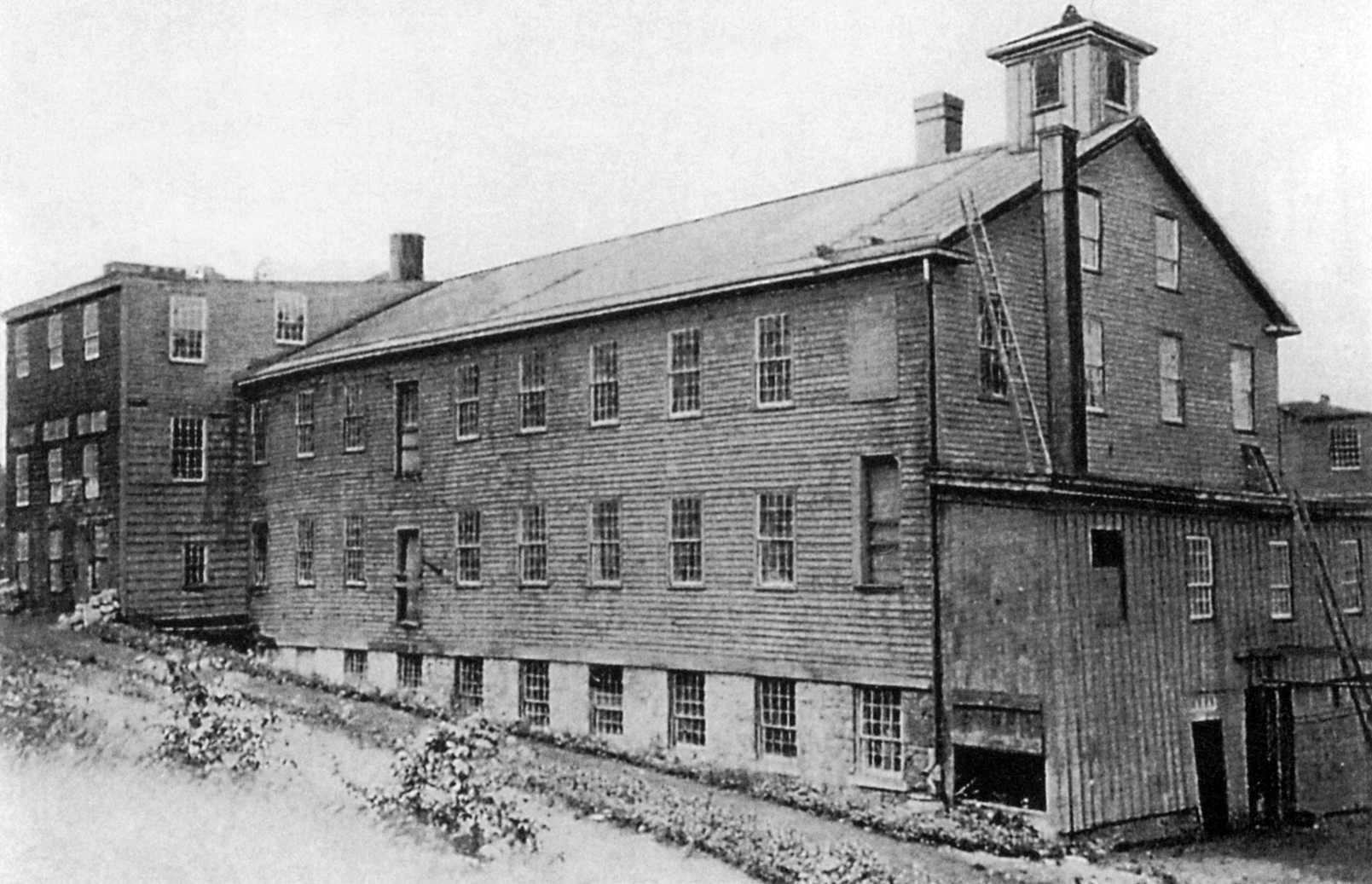 Remington-Fabriksgebäude